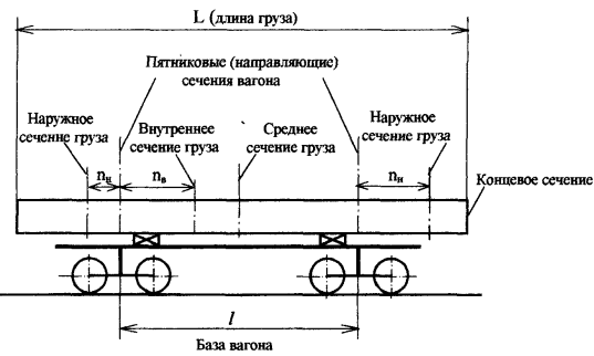 Схема сечений груза на одиночном вагоне